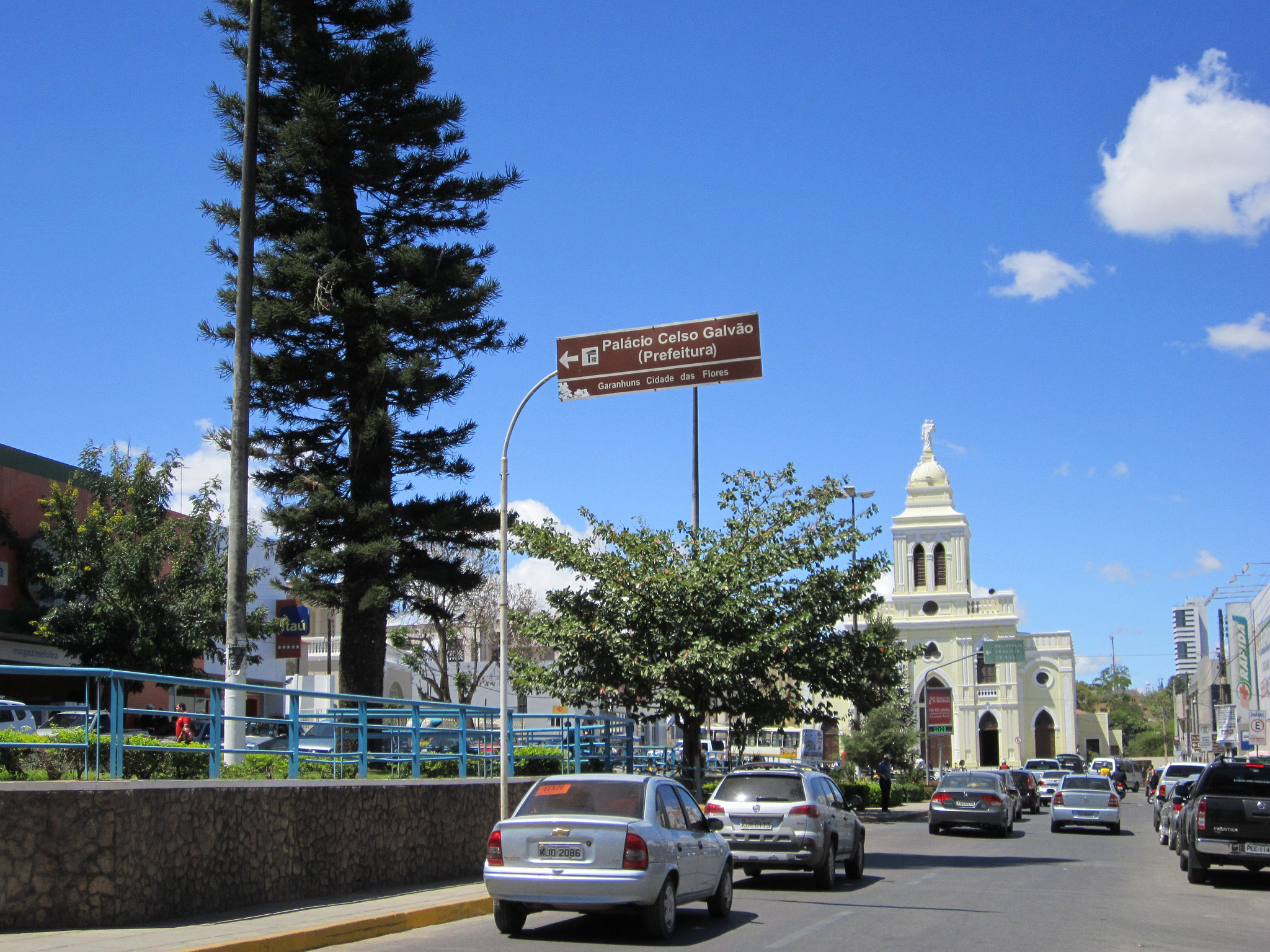 Igreja de Santo Antonio - Garanhuns, Pernambuco, Brasil